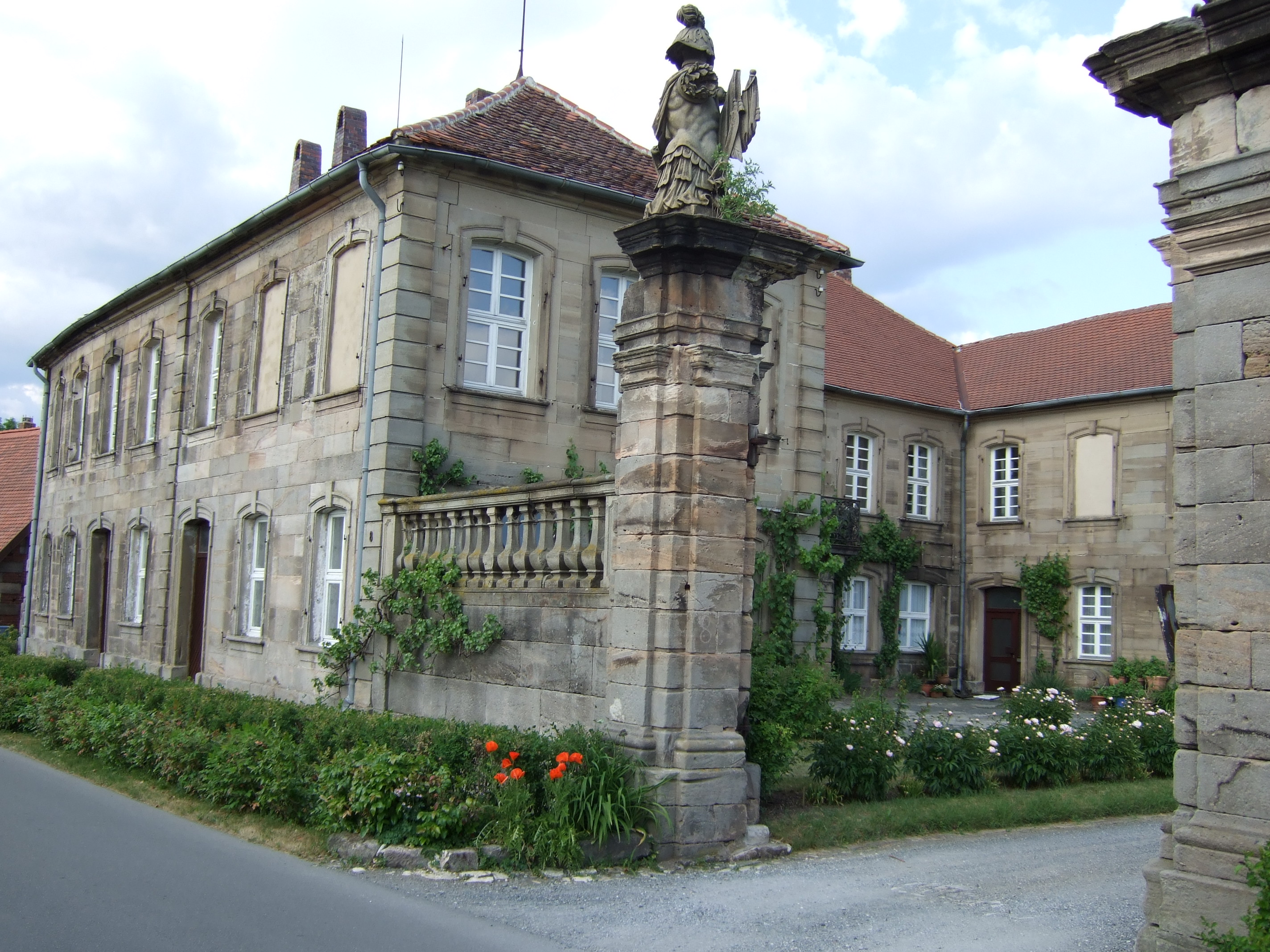 Schloss Colmdorf